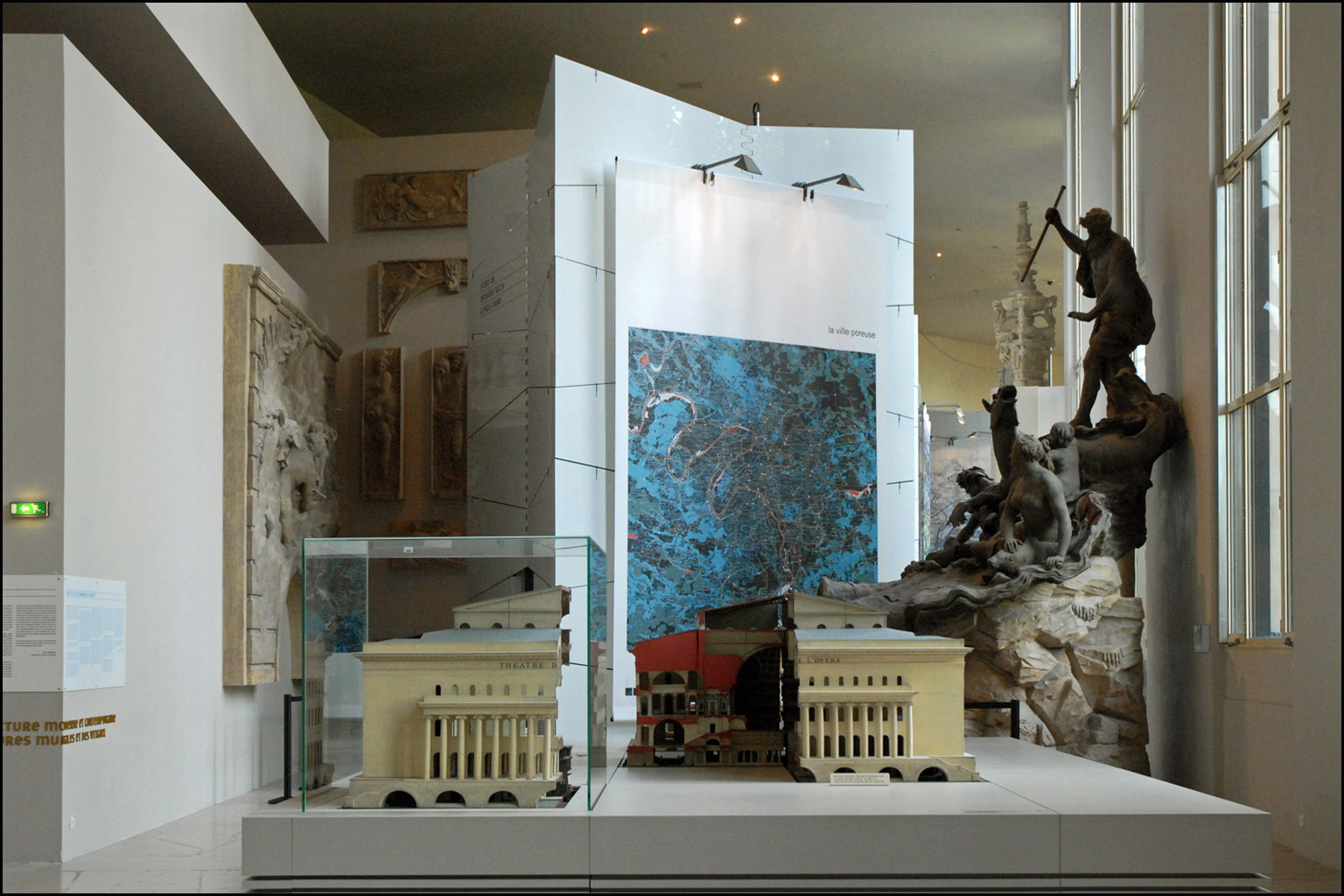 Le Grand Pari(s) Consultation internationale de recherche et développement à la Cité de l'architecture et du patrimoine à Paris Une exposition des 10 scénarios pour la métropole parisienne "Le musée de la Cité accueille, au sein de sa collection de moulages de monuments français les 10 projections sur l’avenir du grand Paris. La scénographie signée Jean-Christophe Quinton, lauréat des NAJA 2004, articule 10 modules contemporains dans un parcours historique, laissant à chaque équipe la liberté d’investir son espace pour présenter sa proposition. Soit 10 modes de représentation pour 10 stratégies de recherche et de développement." (discours officiel) NDLR : Les modules présentant les propositions des cabinets d'architectes sont bien trop grands pour l'espace muséographique disponible (voir photo de la galerie centrale), il en résulte une impression de confusion et d'entassement qui ne favorise pas la compréhension des projets. Lorsqu'on lit qu'il faut densifier Paris et construire de nouvelles tours, on se demande si les éminents architectes consultés ont déjà pris le métro ou le RER aux heures d'ouverture ou de fermeture des bureaux, notamment sur la ligne 1 ou le RER A qui mène à la Défense et que dire des embouteillages du matin ou du soir partout dans la ville et la banlieue, sans parler des grèves à répétition ou des pannes dans les transports collectifs! Que l'on ne vienne pas nous dire non plus que les prix des appartements à Paris vont baisser et que tout le monde pourra aller à pied à son travail dans des avenues devenues des paradis de verdure ! Qui pourrait croire à ces délires de théoriciens de l'urbanisme. Si c'est le grand Pari(s) qu'ils nous préparent, il vaudra mieux aller vivre ailleurs car il sera encore plus qu'aujourd'hui réservé à une élite sociale.